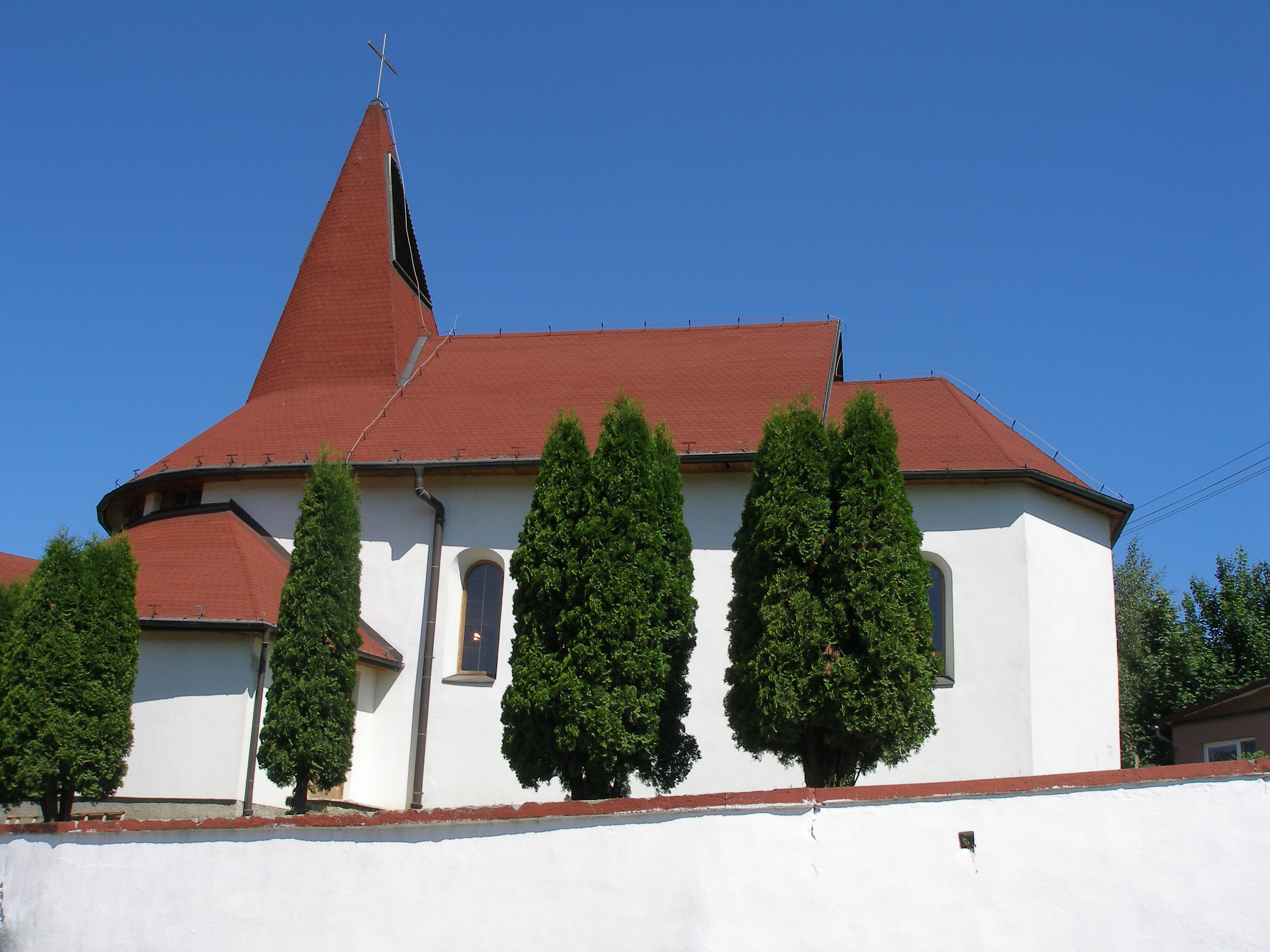 Obec Uzovský Šalgov okres Sabinov.